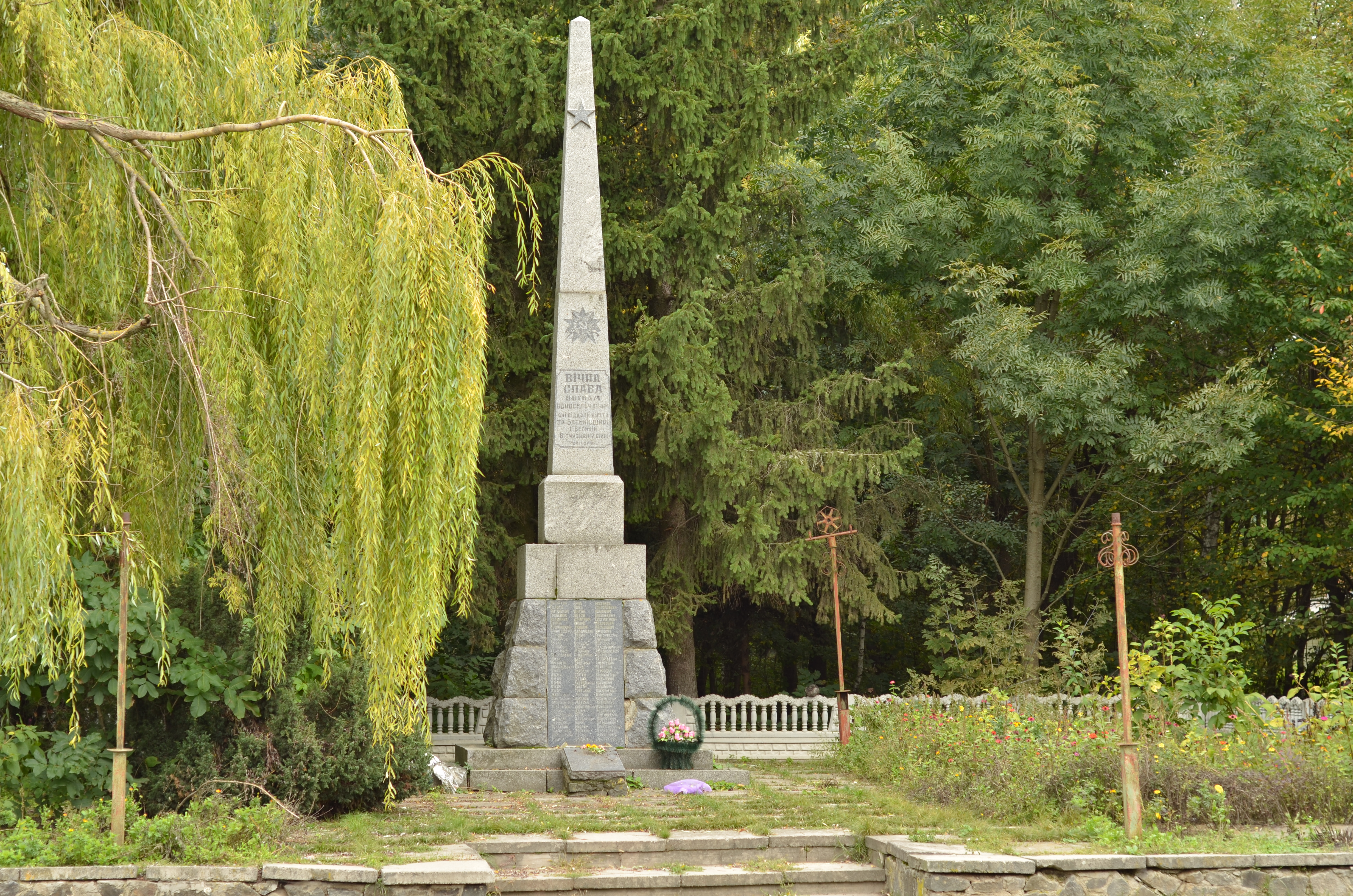 Пам’ятник 97 воїнам – односельчанам, загиблим на фронтах ВВВ, Тиврівський район, с. Яришівка, Яришевська с/р, в центрі села